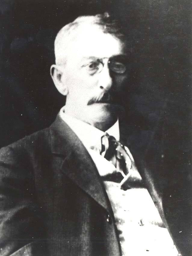 Petru Th. Missir